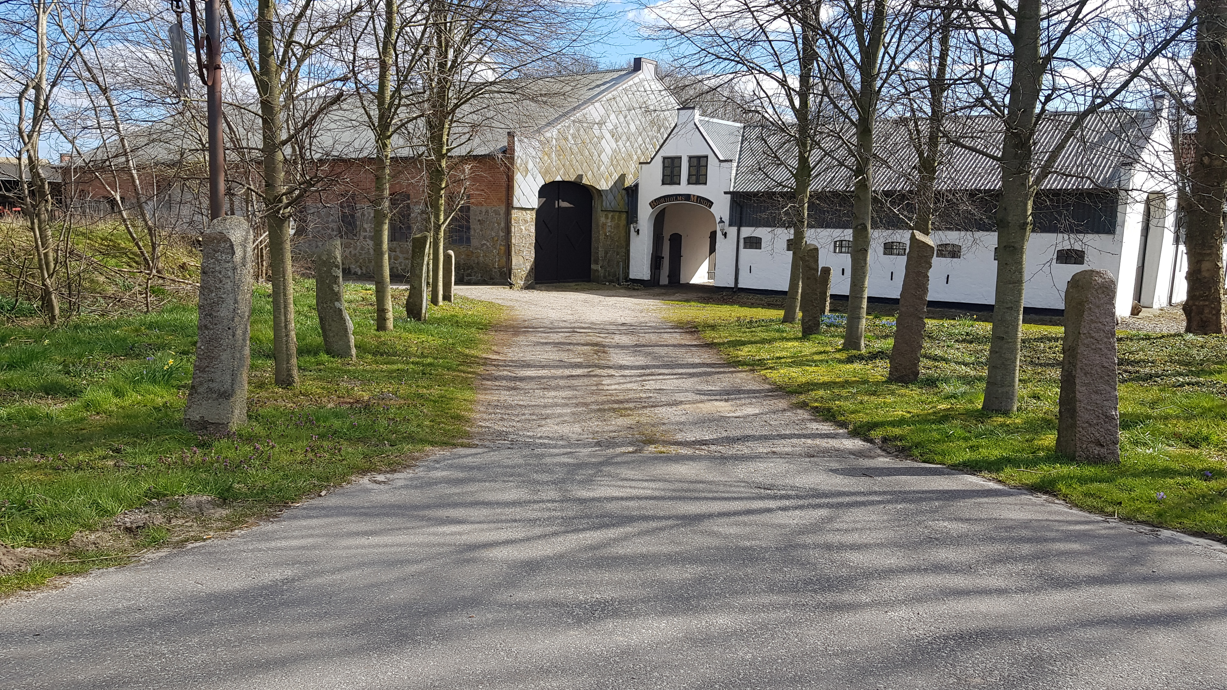 Bjorholms Minde set fra vejen